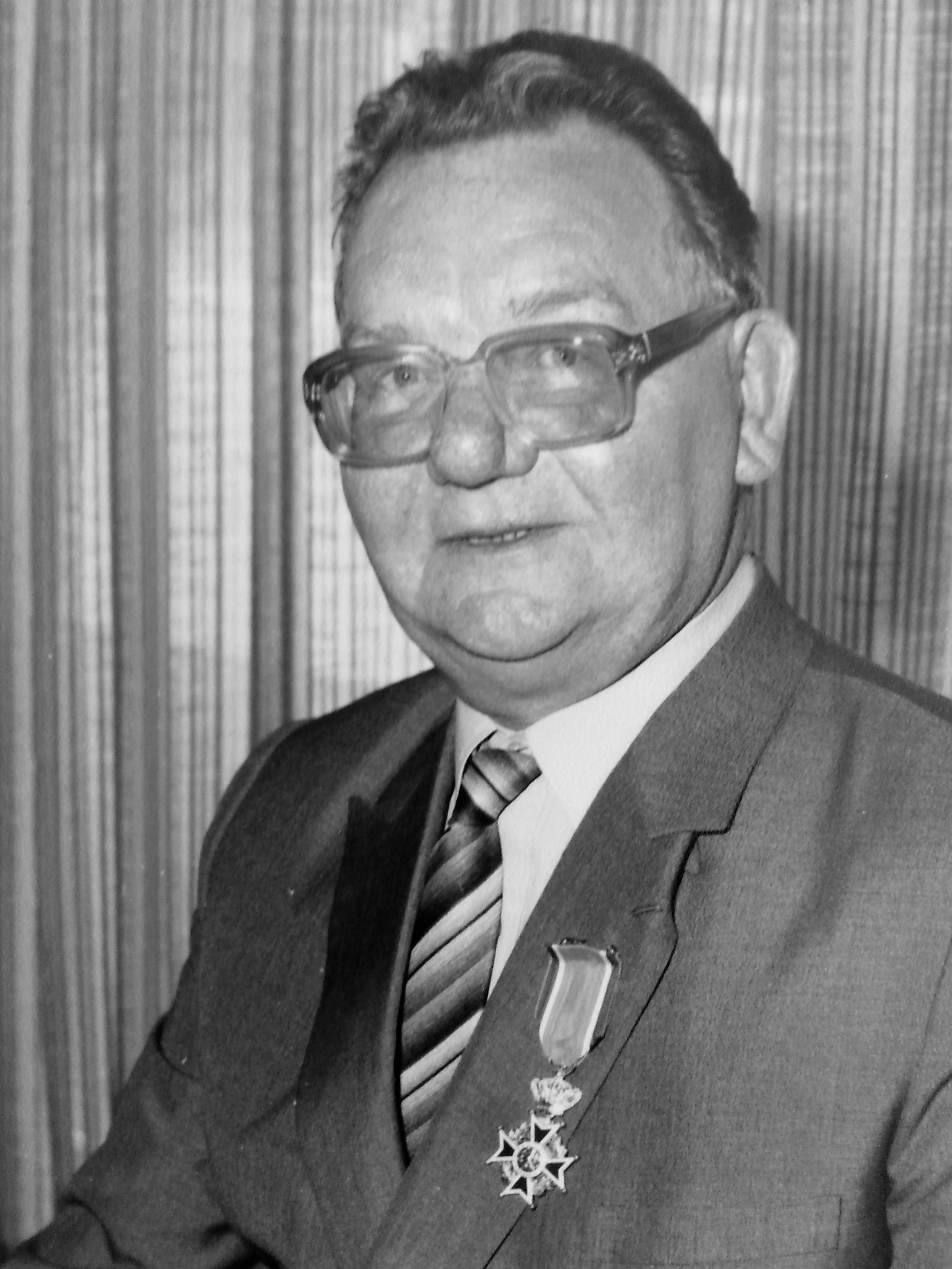 Jan Hoogenbosch is een Nederlandse ingenieur die als ontwerper aan de wieg stond van de moderne sleepvaart en zijn ideeën realiseerde bij Smit Sleepvaart